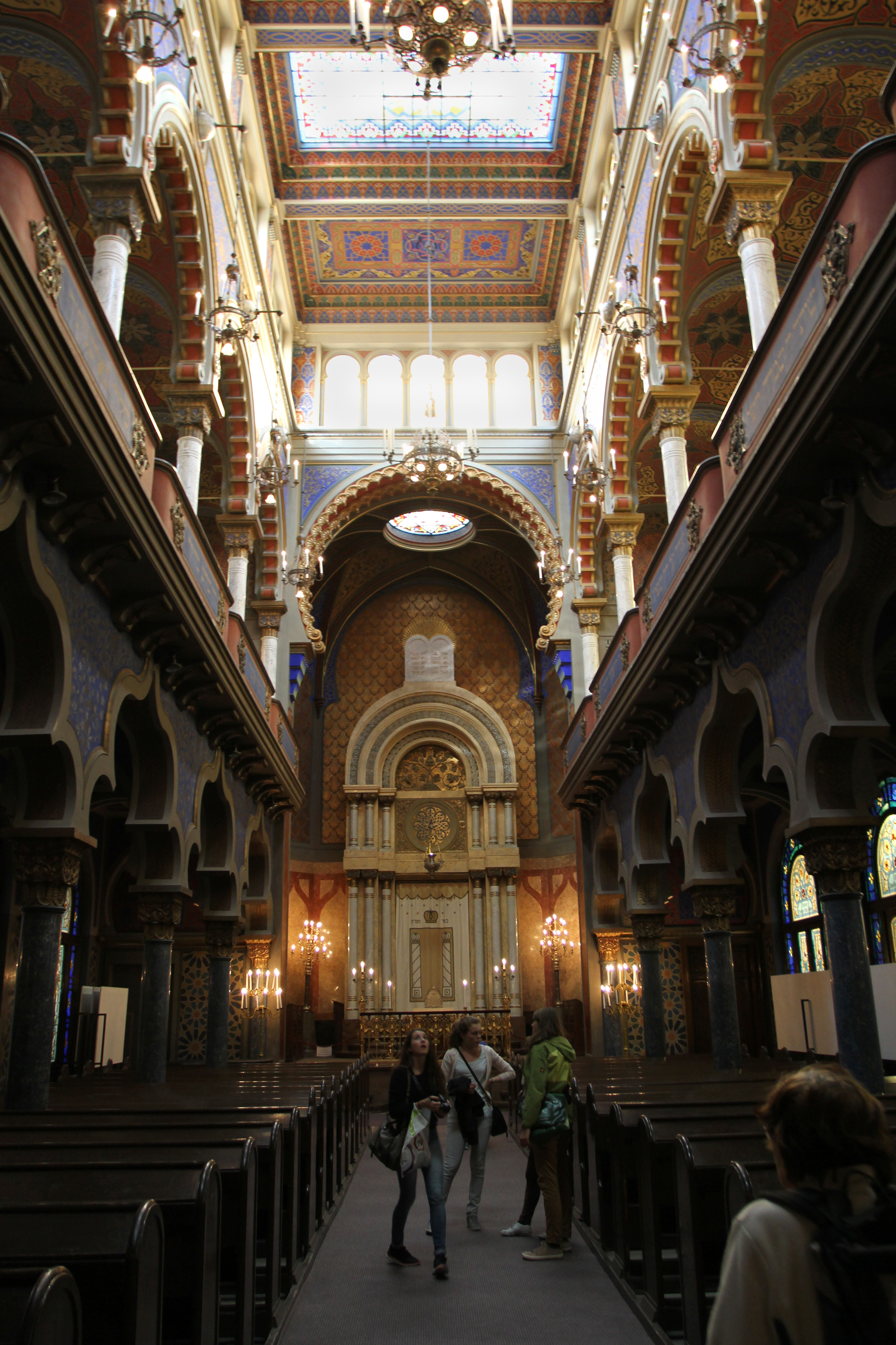 Synagoga Jubilejní (Nové Město), Praha 1, Jeruzalémská 1310/7, Nové Město